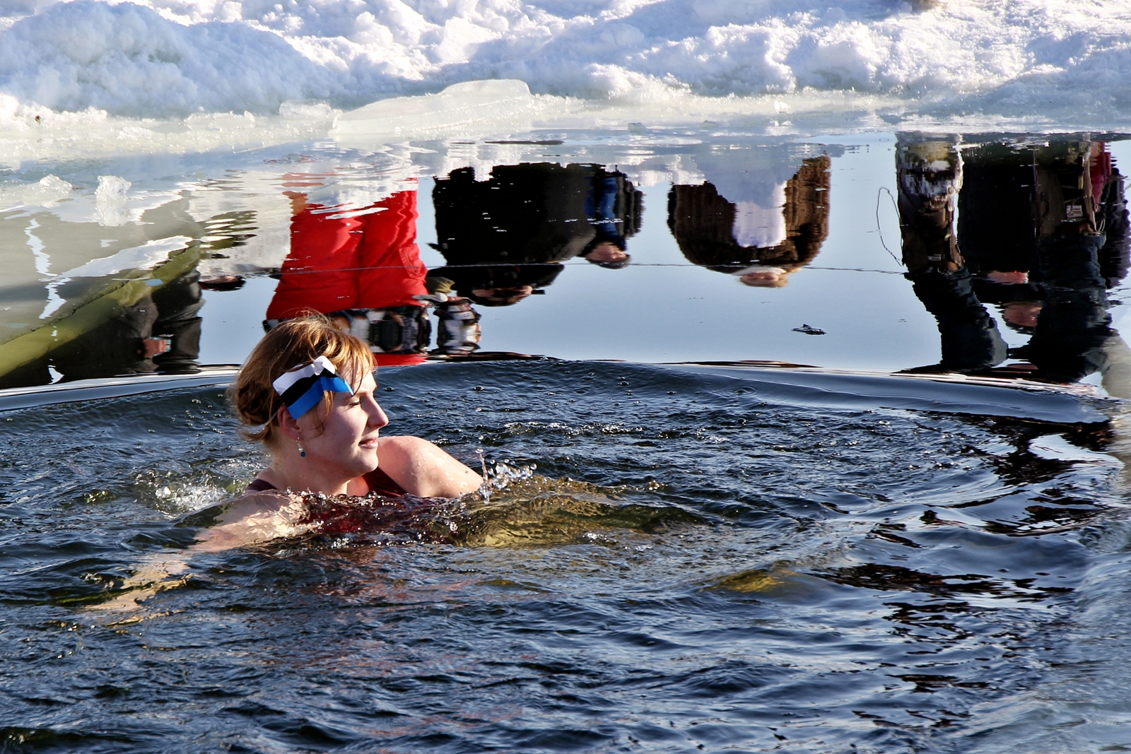 Talvine ujumine. Korraldaja - triatloni klub Trismile.